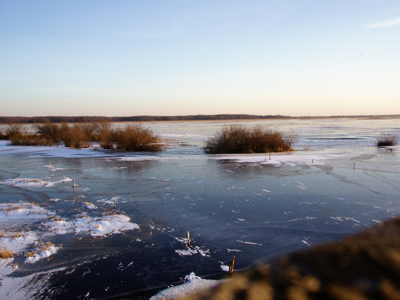 Rzeka Biebrza zimą w okolicach Brzostowa